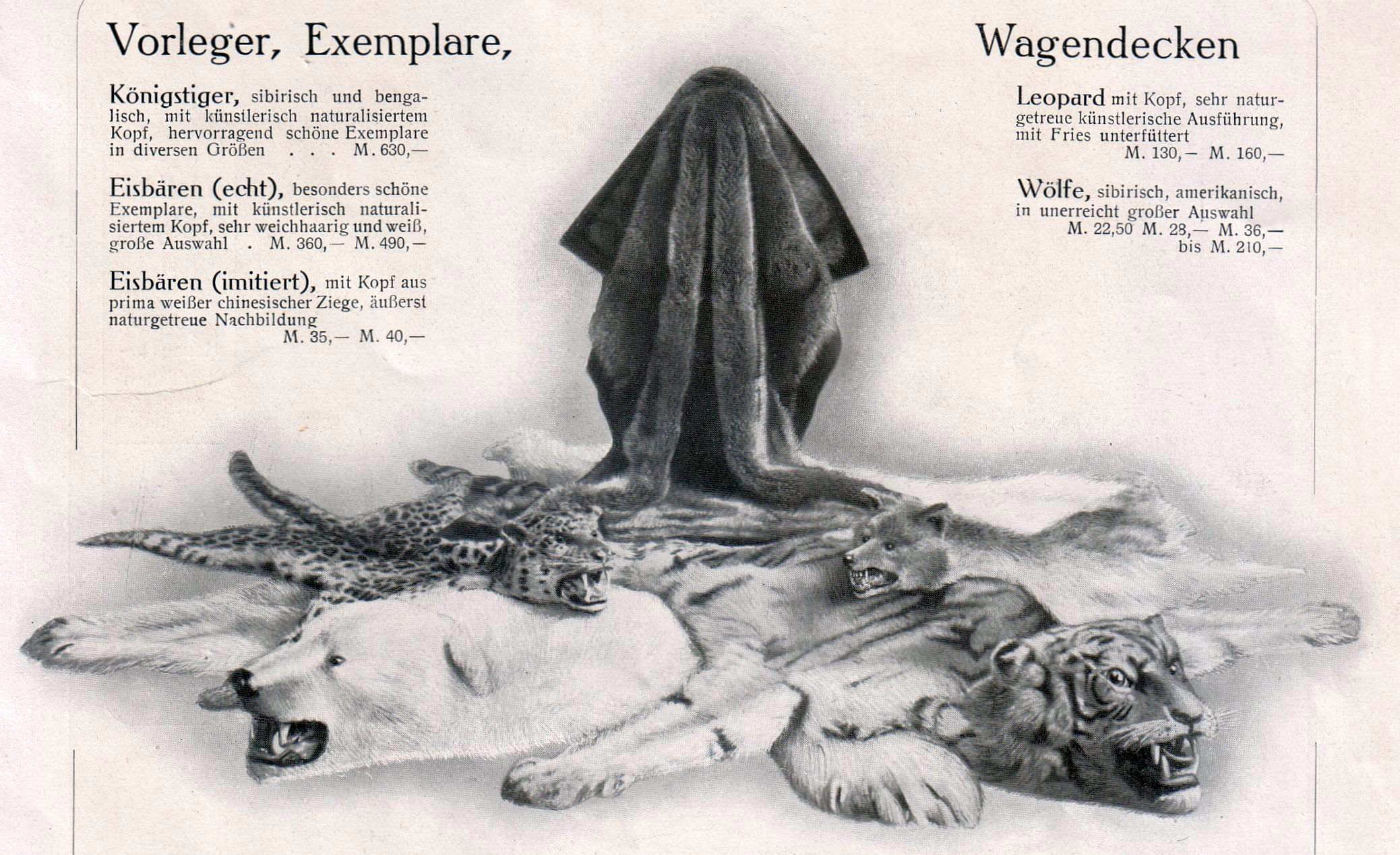 C. A. Herpich Söhne, Berlin, Modewaren 1910 (Prospekt)